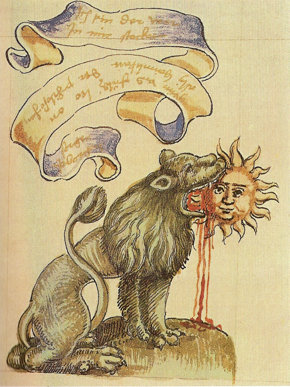 Der grüne Löwe, der Sol verschlingt. Book illustration in Rosarium philosophorum, published 1550 in Frankfurt a.M., Germany